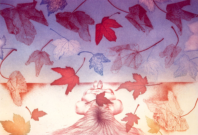 Aquatínta Radierung